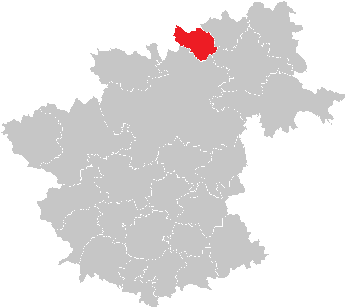 Bezirk Zwettl